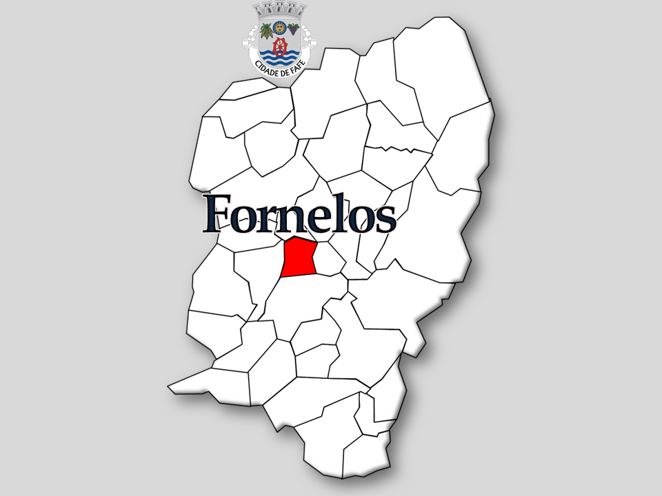 Censos 1864/2011